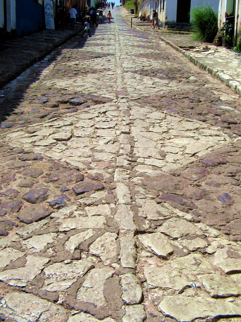 Alcântara, MA: conjunto arquitetônico e urbanístico; Ladeira do Jacaré; Porto do Jacaré.